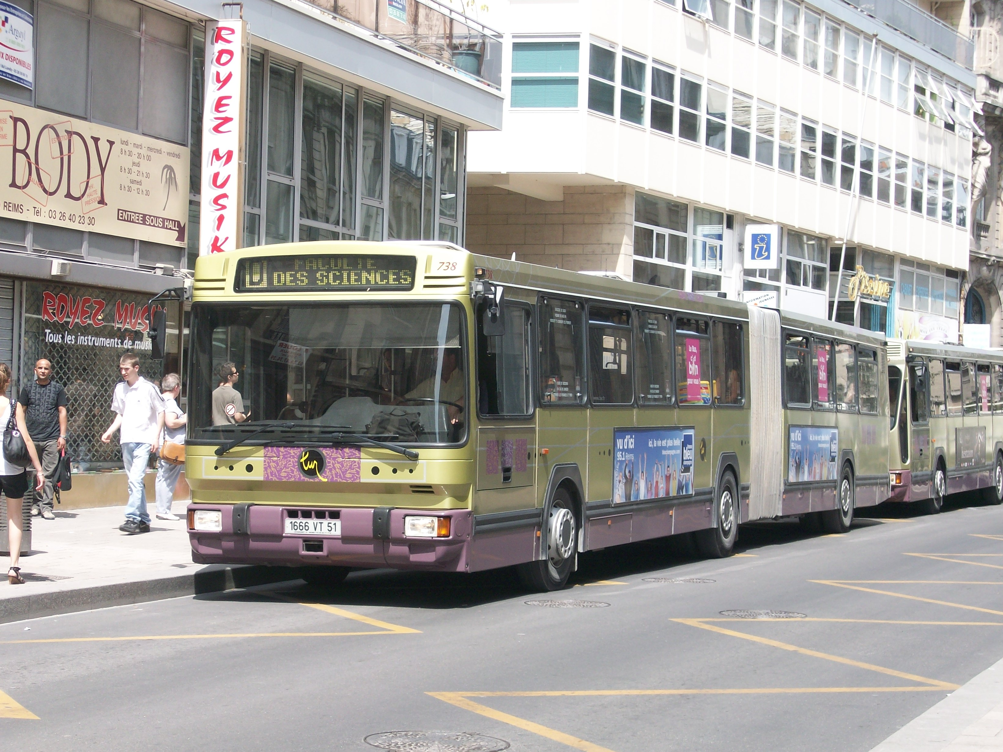 Renault PR 118, Reims